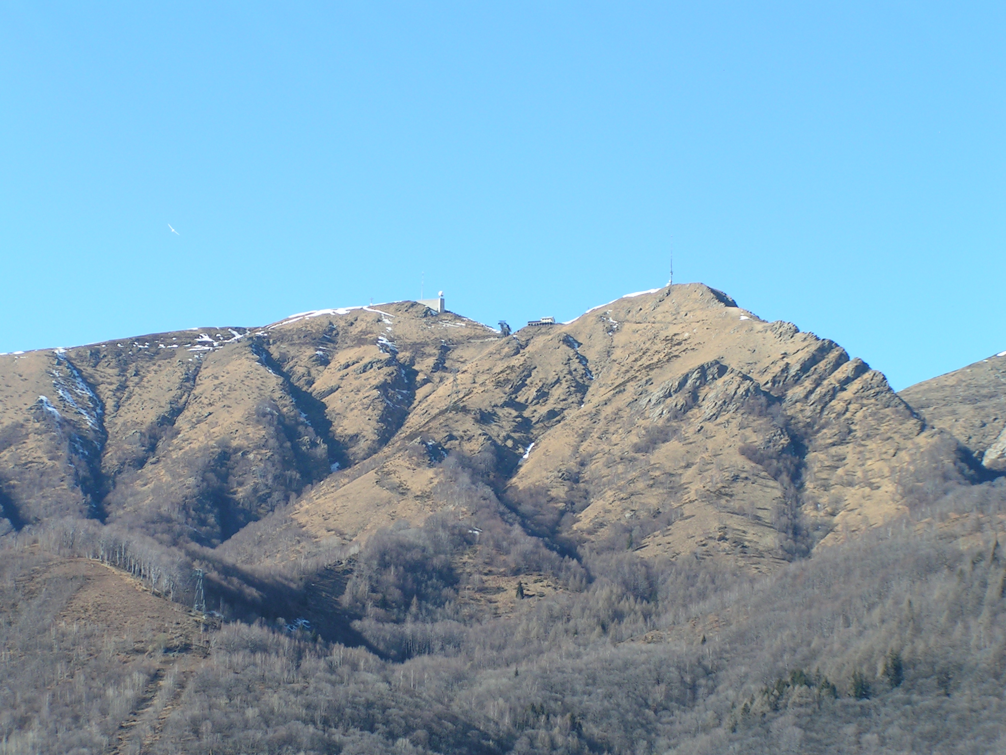 Monte Lema da Est